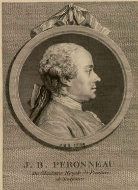 Portrait de Jean-Baptiste Perronneau